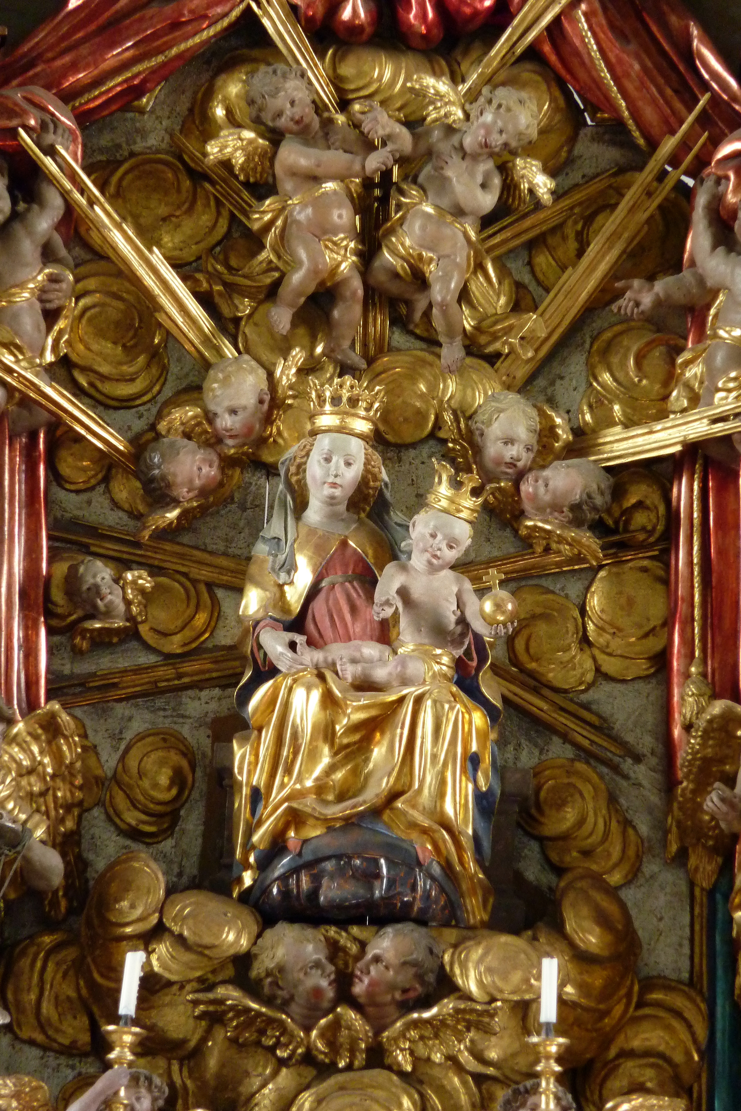 Katholische Pfarr- und Wallfahrtskirche Mariä Heimsuchung in Gottmannshofen, einem Stadtteil von Wertingen im Landkreis Dillingen an der Donau (Bayern), Gnadenbild (Maria mit Jesuskind), um 1480